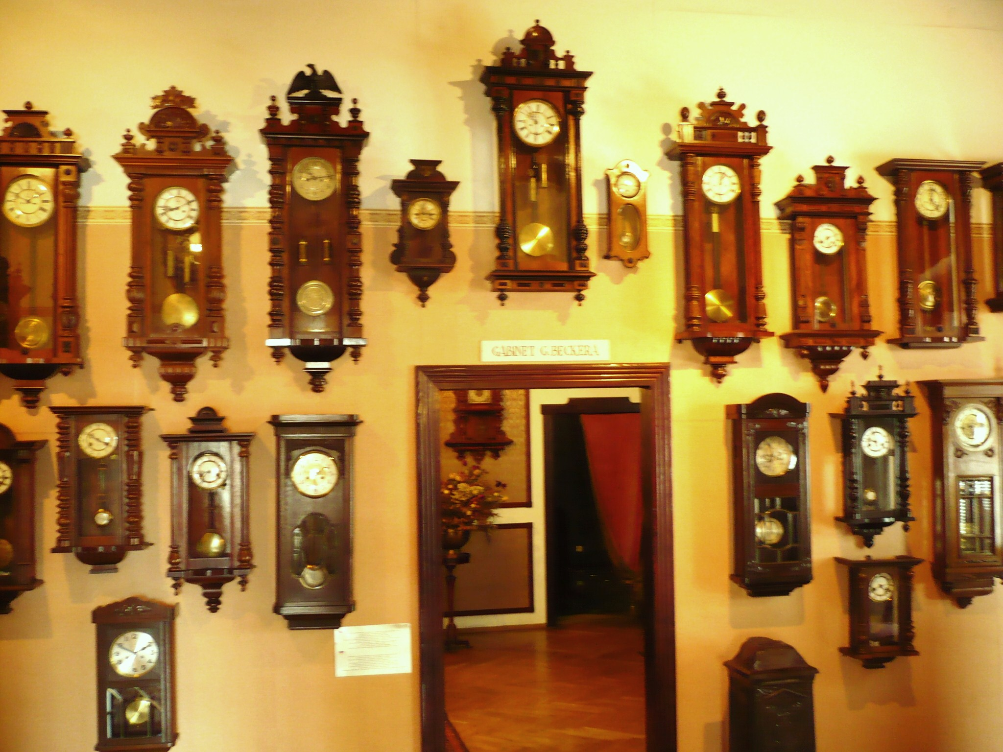 Zegary Gustava Becker